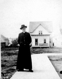 Abbé Pierre Gravel, vicaire à St-Alphonse de 1924 à 1935, vers 1930.